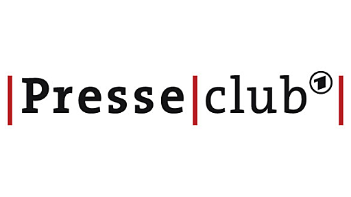 Logo der Informationssendung Presseclub (WDR)